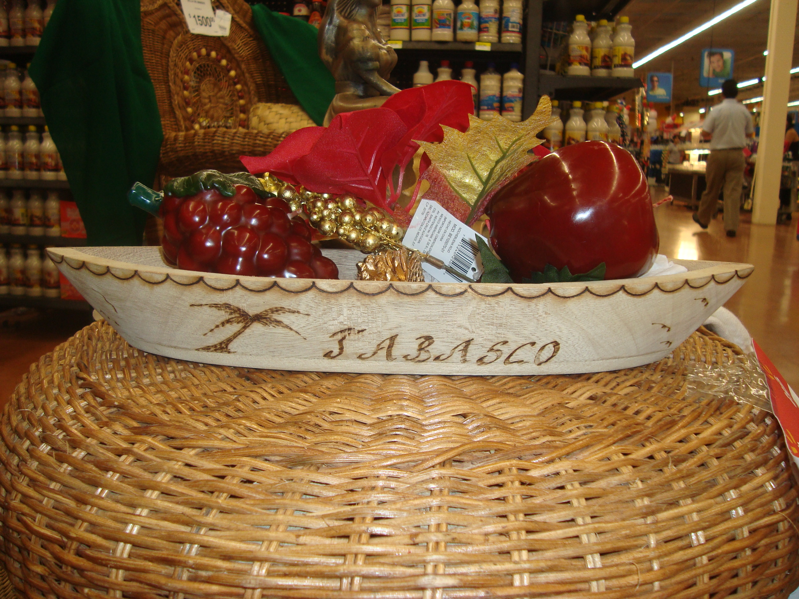 Cayuco de madera con adornos navideños. Artesanía típica del municipio de Jalapa, Tabasco, México.